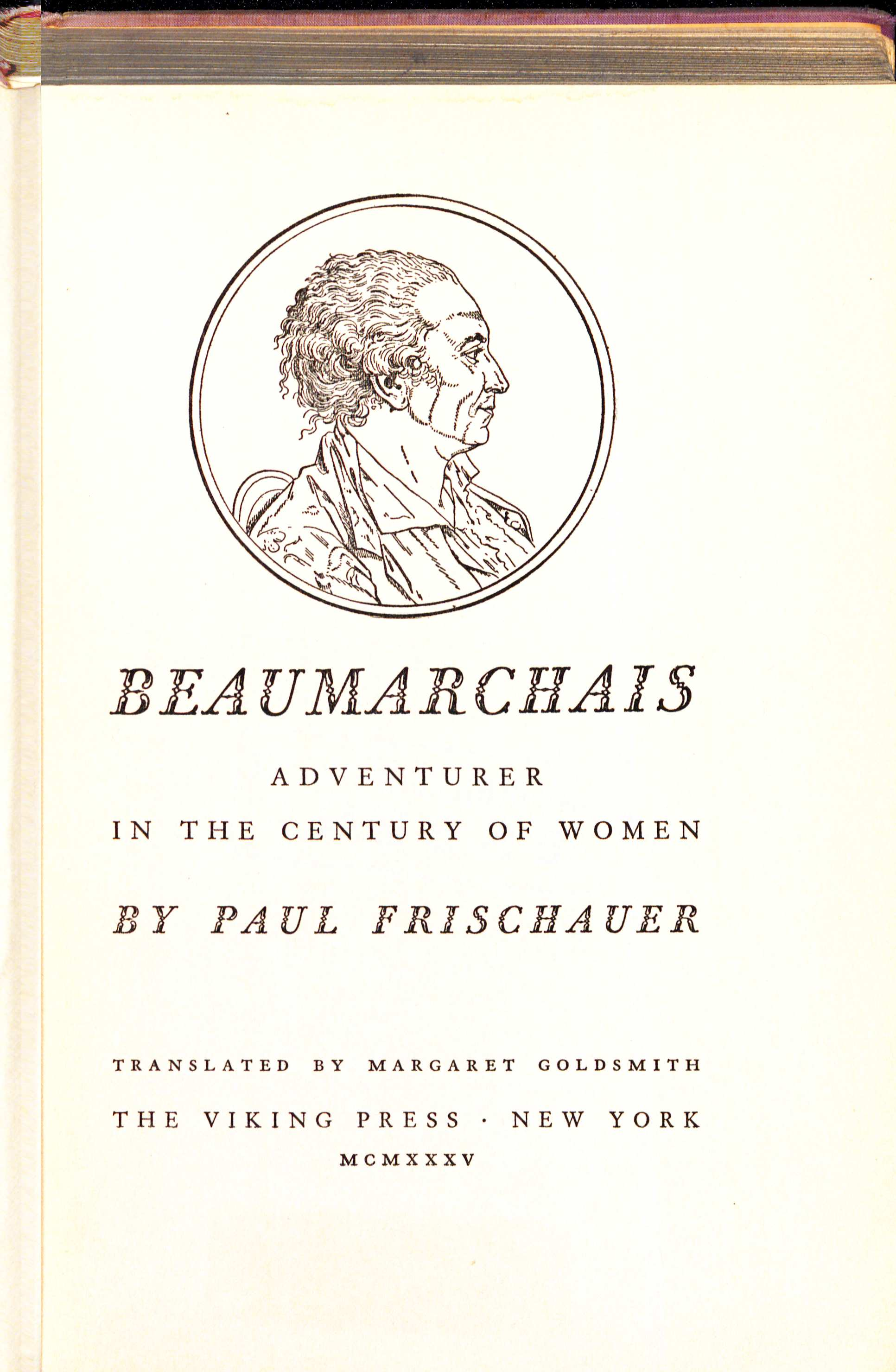 Paul Frischauer Beaumarchais adventurer in the century of women 1935 translated by Margaret Goldsmith